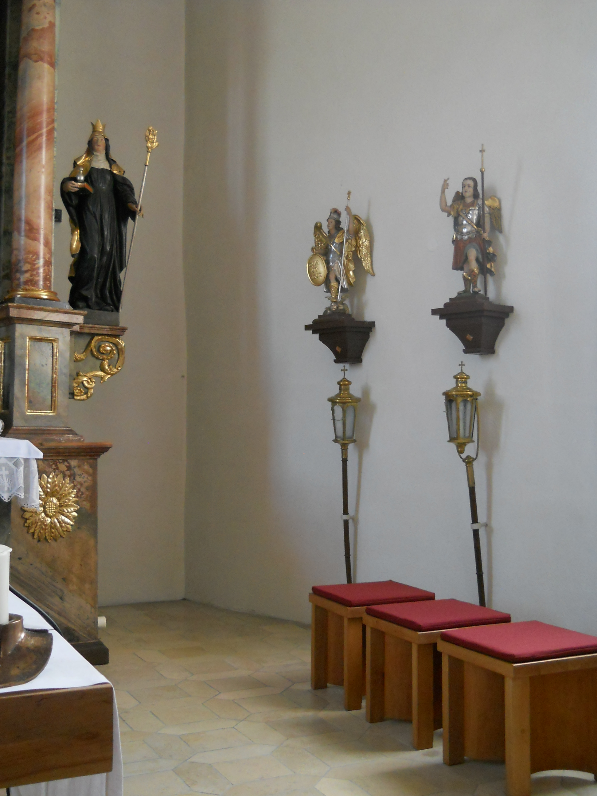 Rauenzell, Ortsteil von Herrieden im Landkreis Ansbach (Bayern), Kath. Pfarrkirche Mariä Heimsuchung, südliche Chorwand